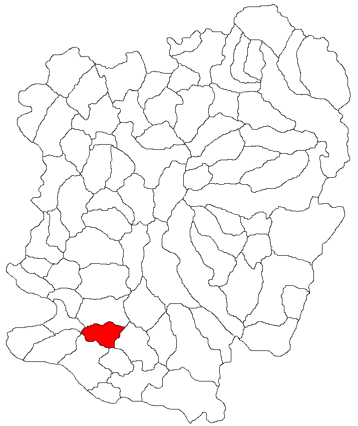 Categorie:Hărţi ale judeţului Caraş-Severin